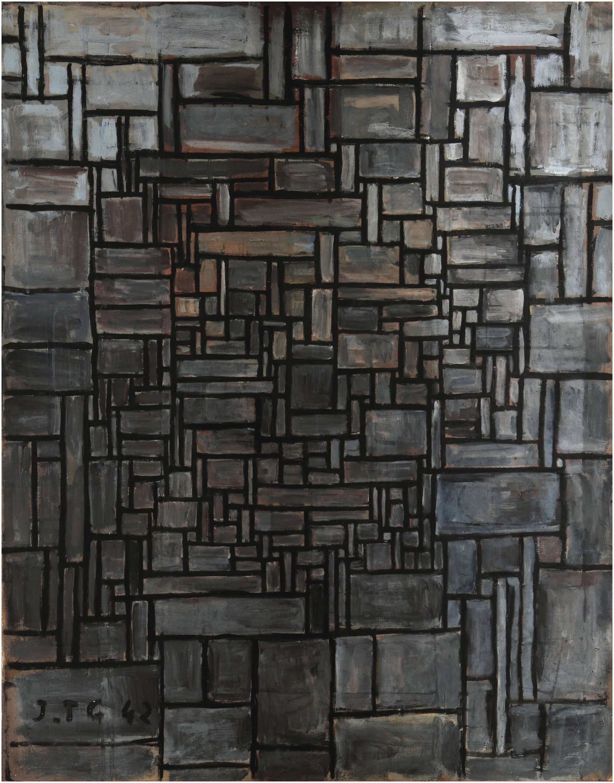 Obra "Arte constructivo" del pintor uruguayo Joaquín Torres García.